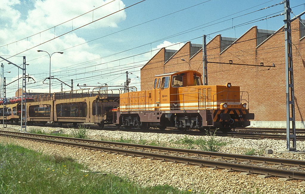 La 311-001 en Madrid